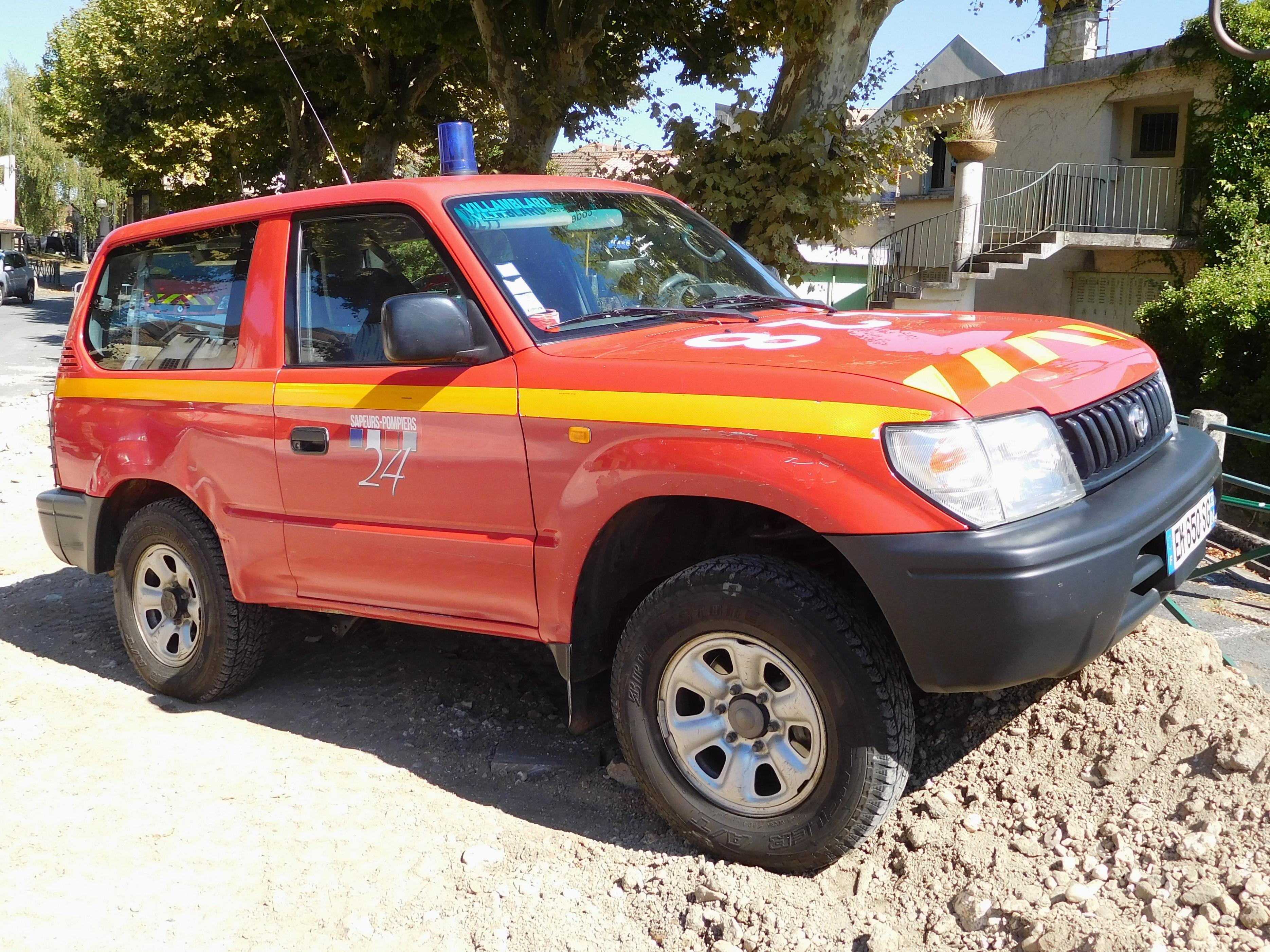 Véhicule de liaison tout-terrain (VLTT) Toyota Land Cruiser de la caserne de Villamblard ; au village congrès, place de la République, Mussidan, Dordogne, France.